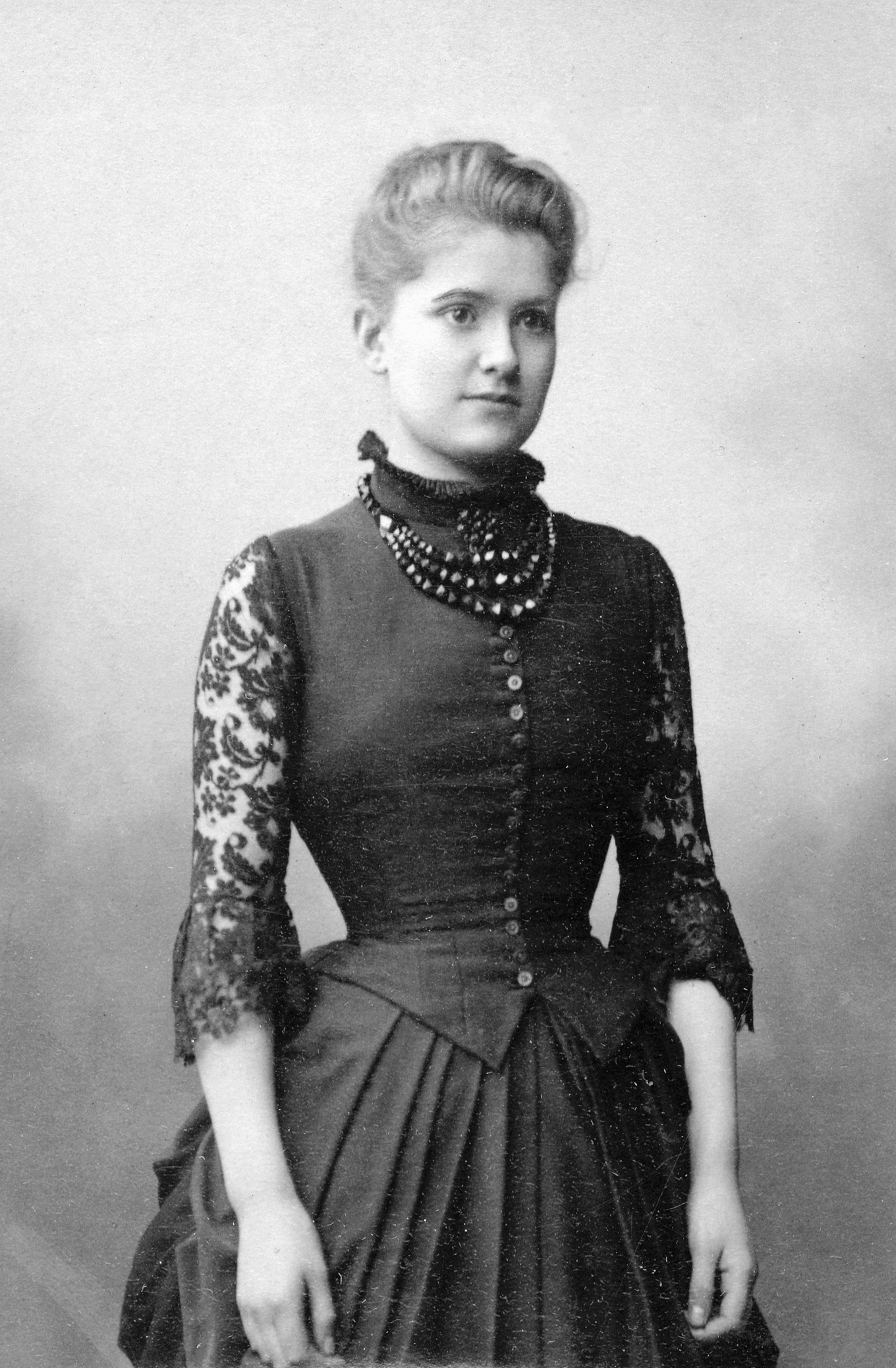 Lotten Seelig, skådespelare vid Svenska teatern 1888